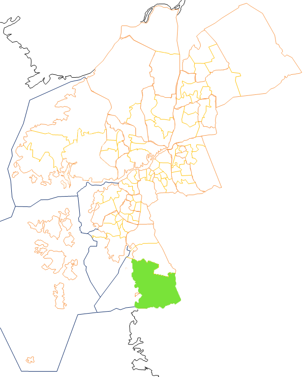 Karta som visar primärområdes belägenhet i Göteborg